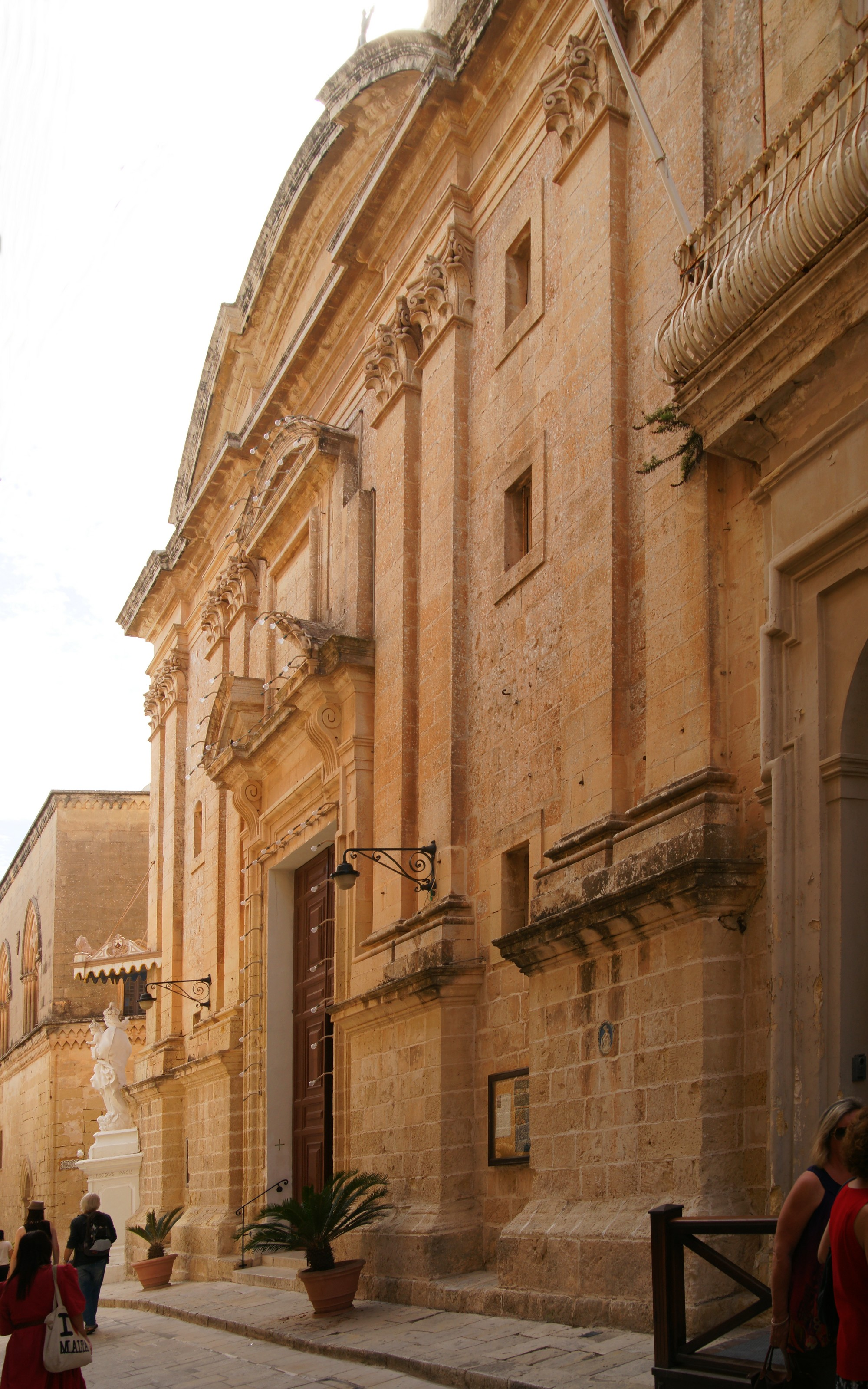 Karmeliterkirche Mdina